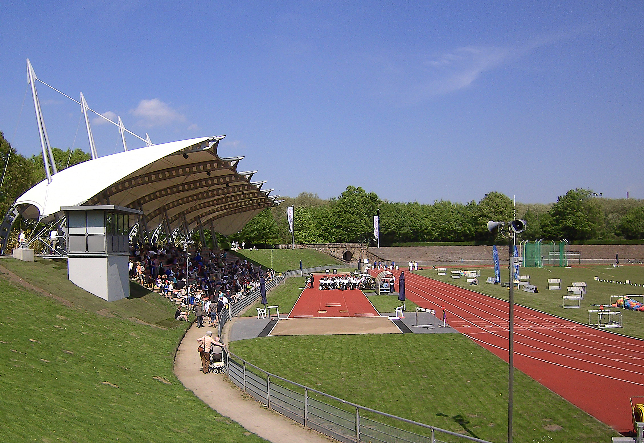 Das Gladbecker Stadion mit dem neuen Tribünendach